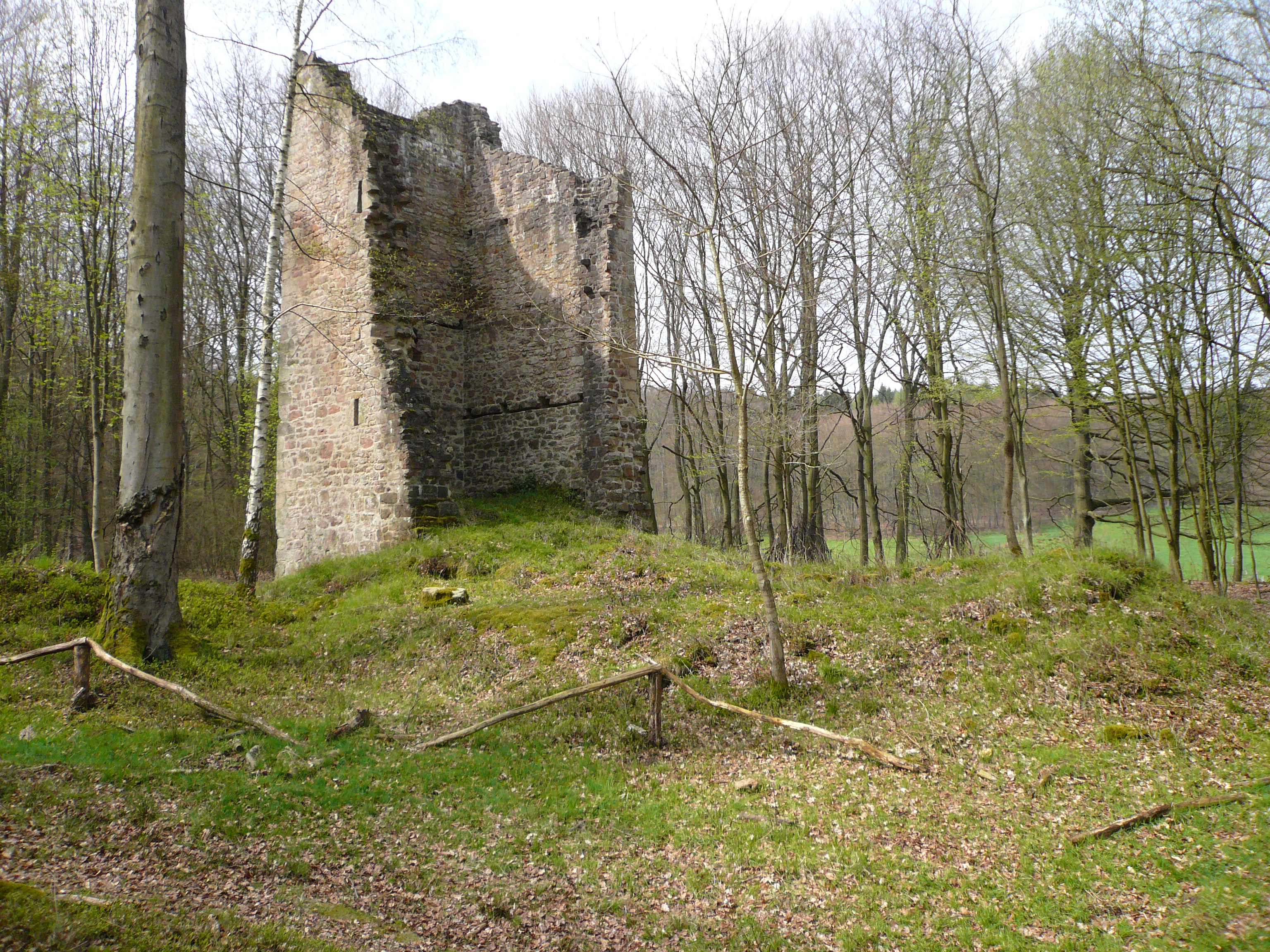 Ruine der Wehrkirche der Wüstung Vredewolt (Friwohler Kirche) im Staatsforst Hardegsen bei Hettensen